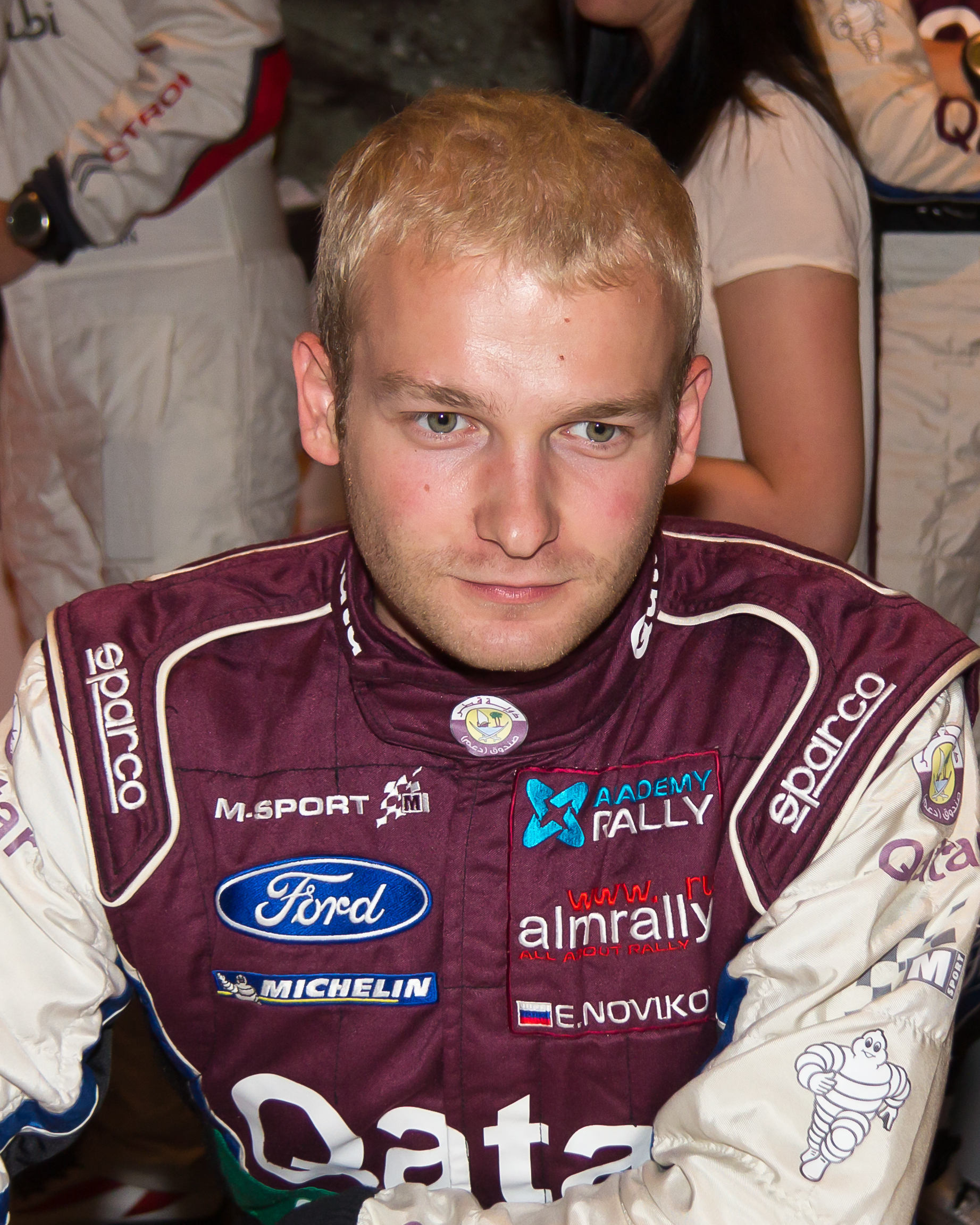 ADAC Rallye Deutschland 2013 - Empfang der Stadt Köln - Evgeny Novikov